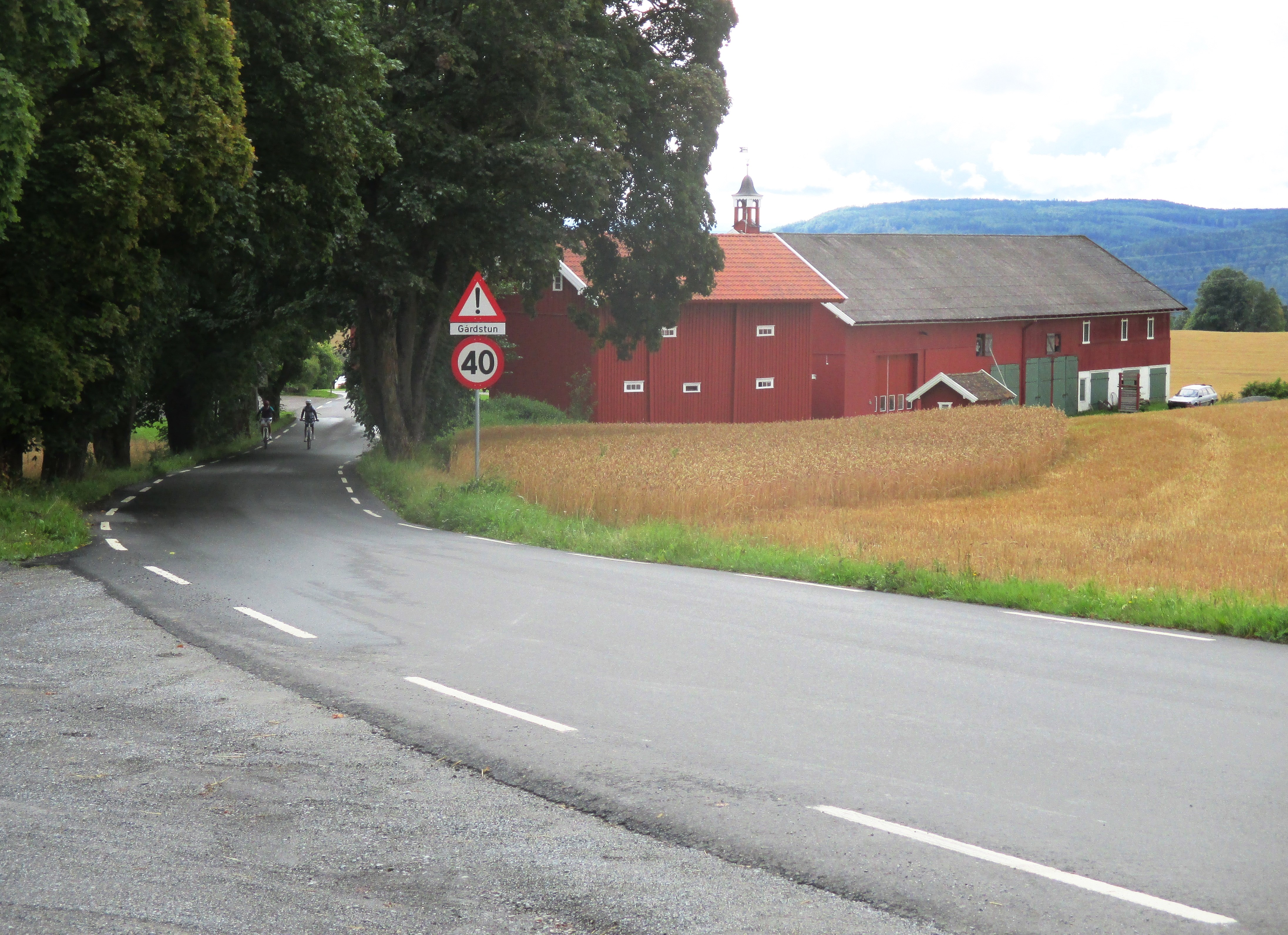 Deglumsvegen (FV1738, tidl. FV69) like ved Furnes kirke